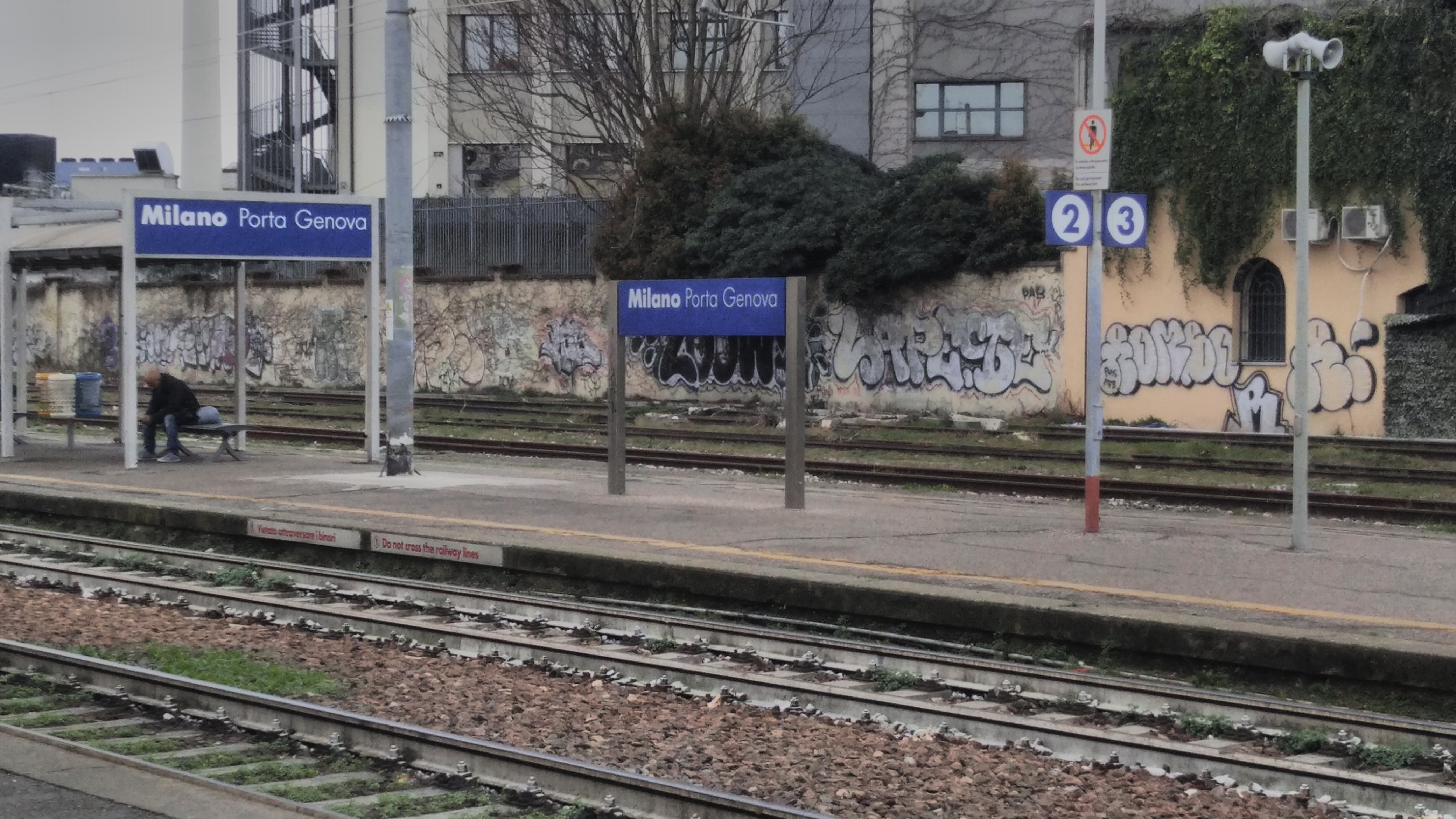 Piano binari della stazione di Milano Porta Genova